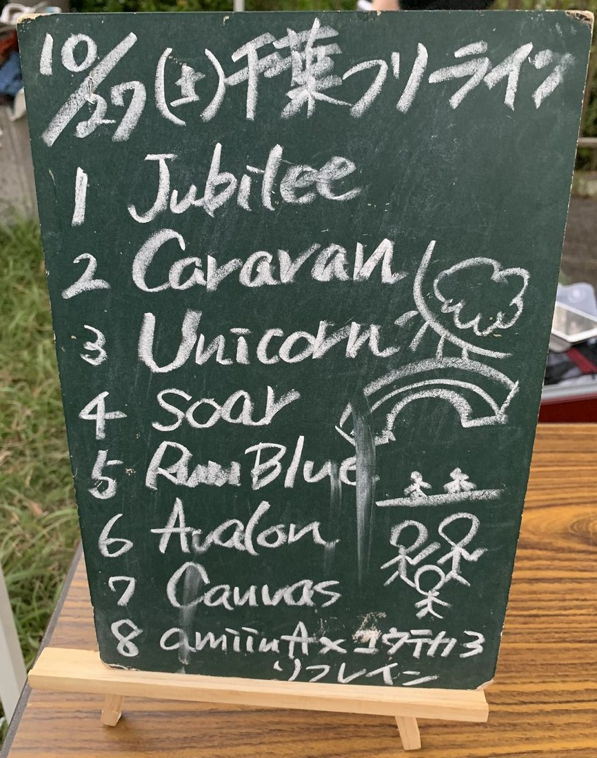 amiinAセトリボード(20181027(1))